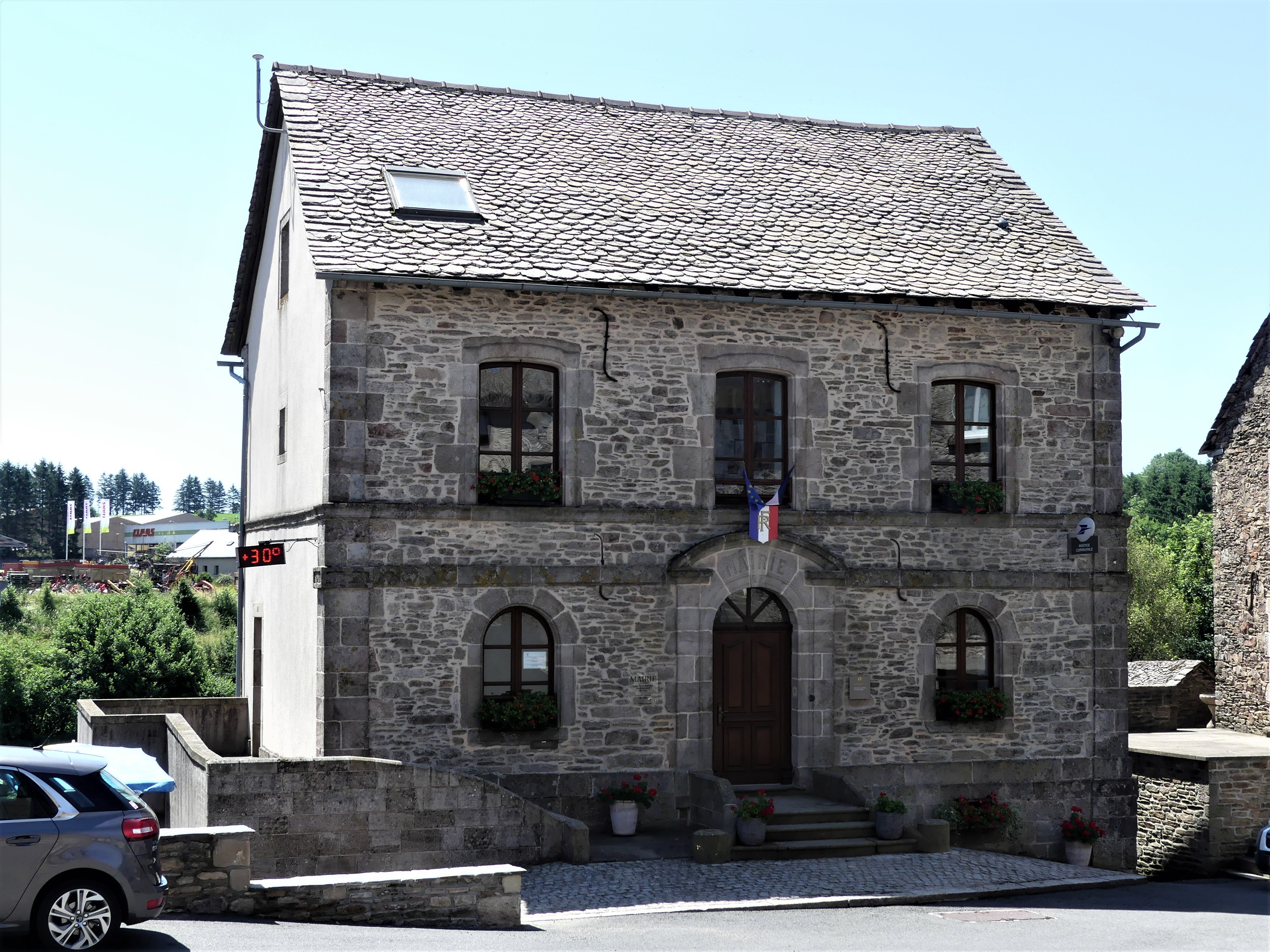 La mairie de Curan, Aveyron, France.